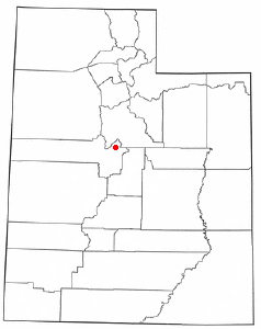 Localización de Mona, Utah